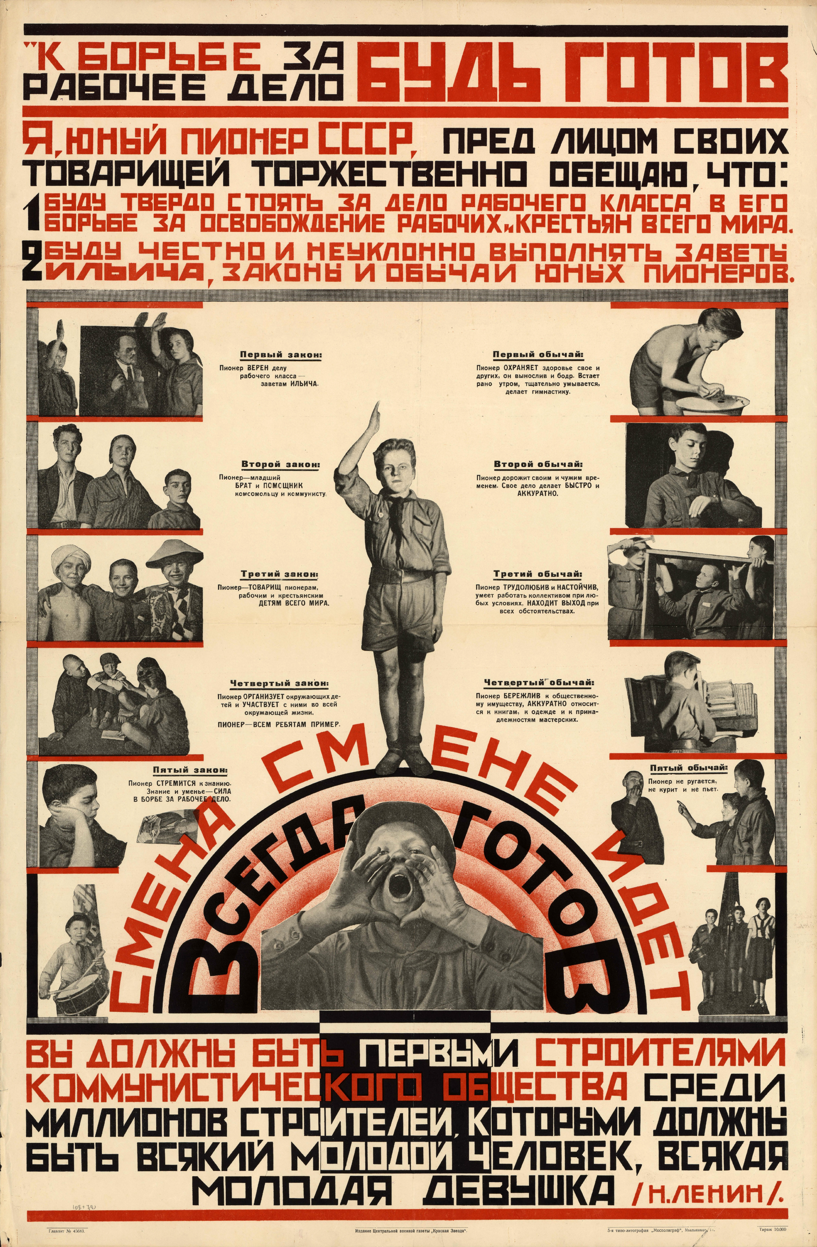 К борьбе за рабочее дело будь готов. Всегда готов. Смена смене идёт : [плакат]. — [Москва] : Центральная военная газета «Красная звезда», [1925] ([Москва] : «Мосполиграф» ; 5-я типолитография). — Автотипия, цветная литография, 1 лист, 108 × 72 см. — 10 000 экз.